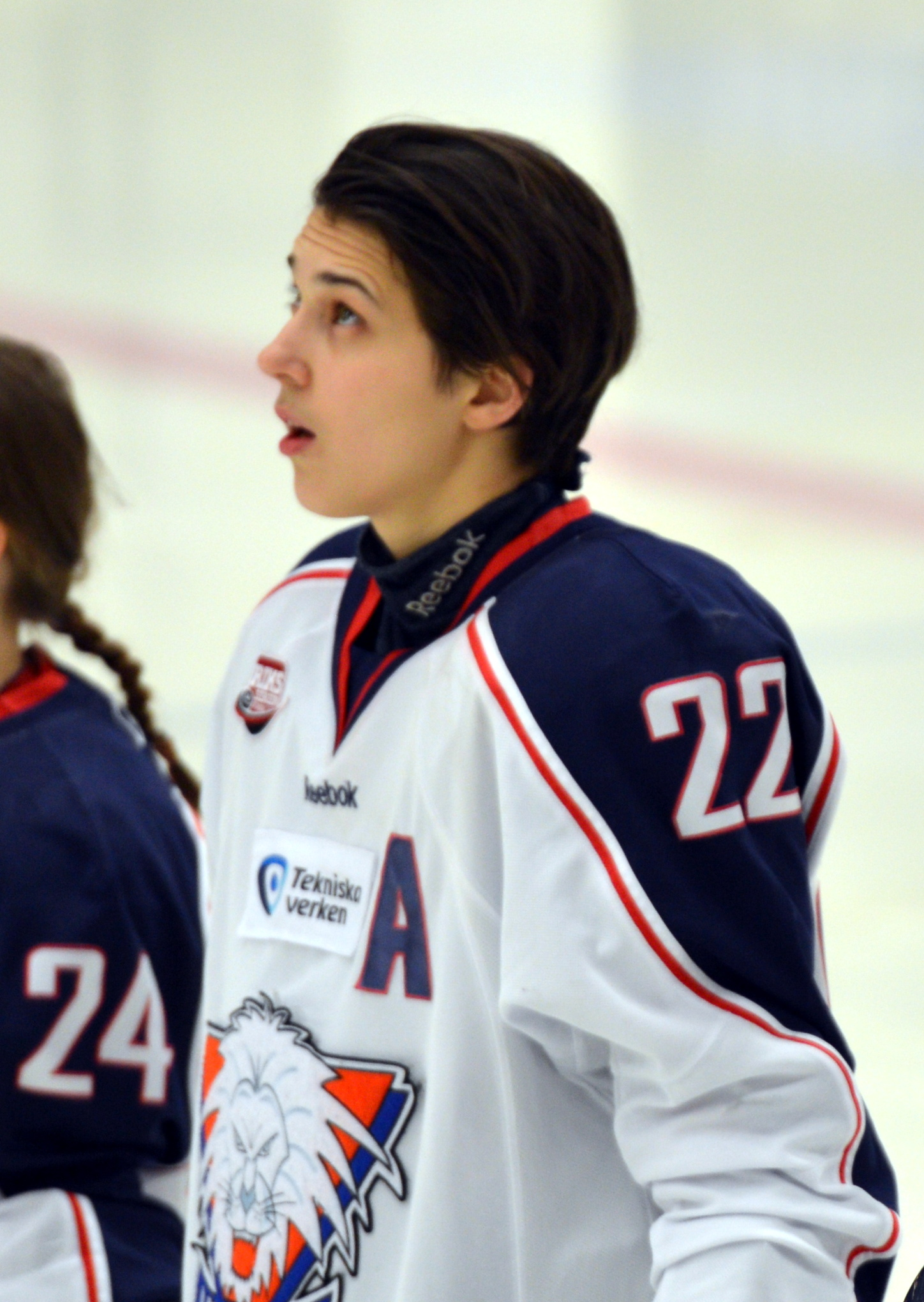 SM-final 1 i slutspelet i ishockey för damer säsongen 2014/2015 mellan AIK Ishockey Damer och Linköpings HC Dam. Matchen spelades i Vilundaparkens Ishall i Upplands Väsby och slutade 0-2. Matchfakta här.